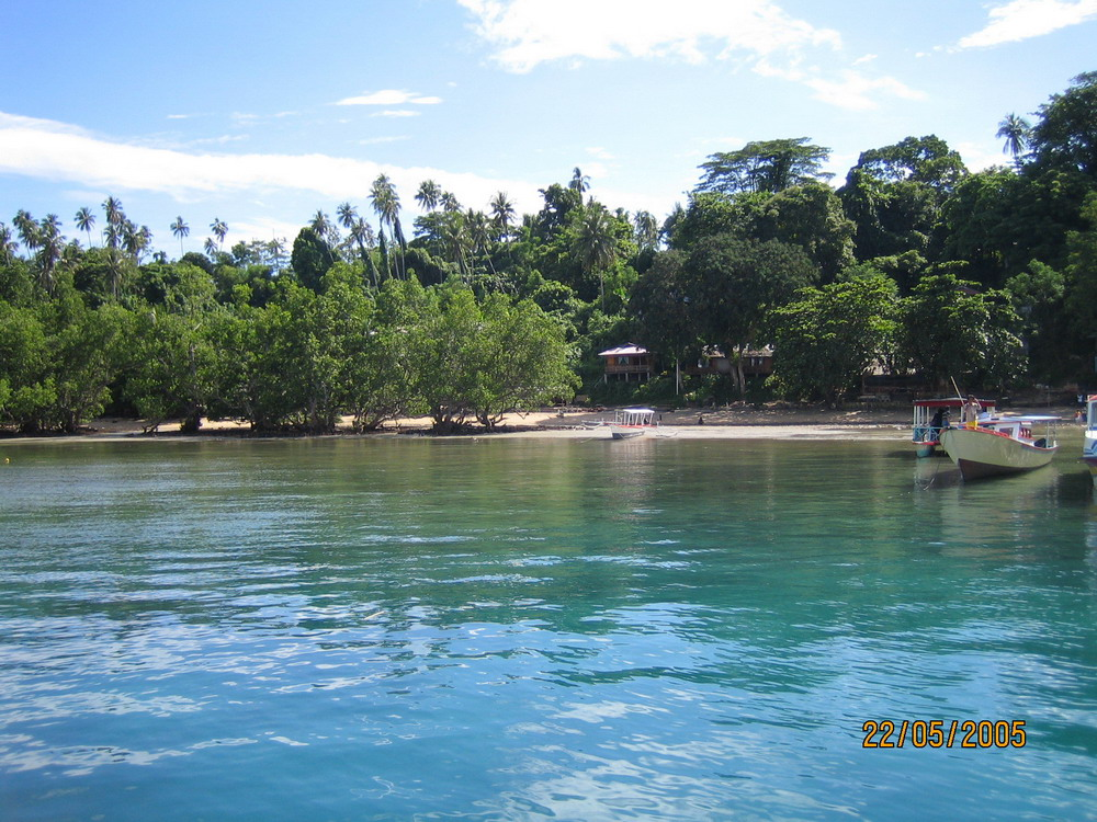 Bunaken marine park at North Sulawesi, Indonesia